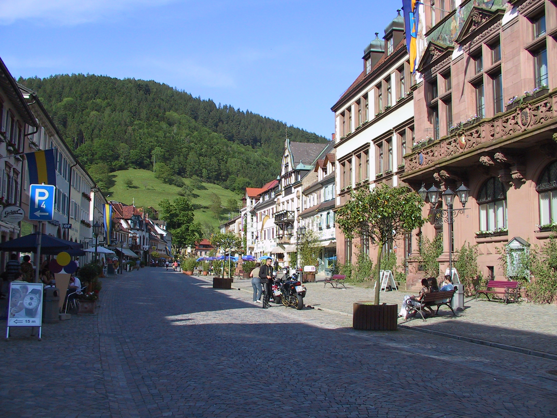 Breite Marktstraße (Hauptstraße) von Wolfach im Schwarzwald